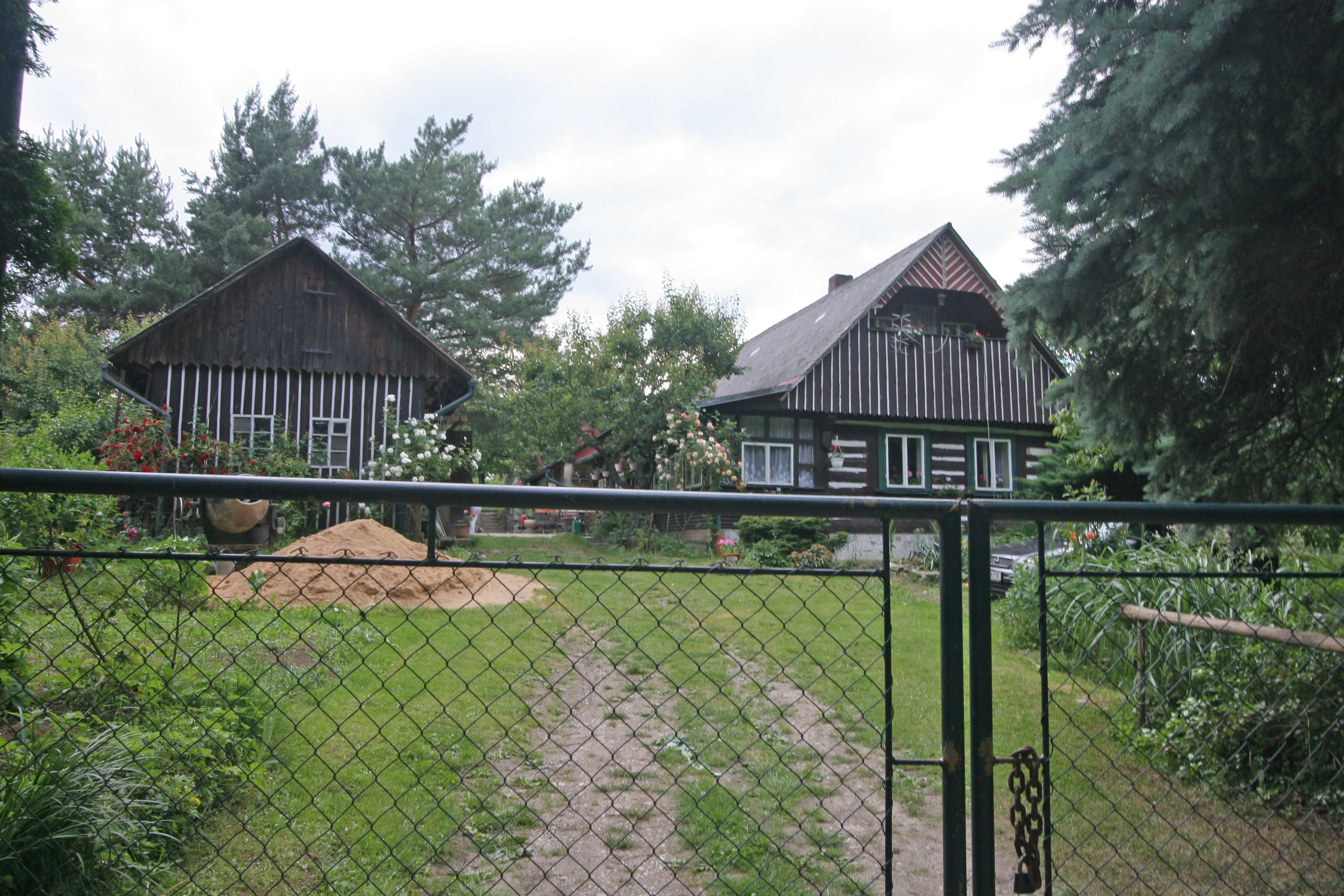 Sedlec čp. 22